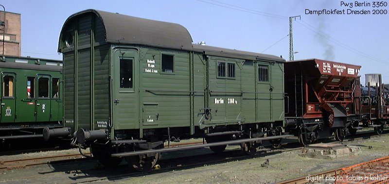 Güterzugbegleitwagen Pwg Berlin 3360, Dampflokfest Dresden, 2000.